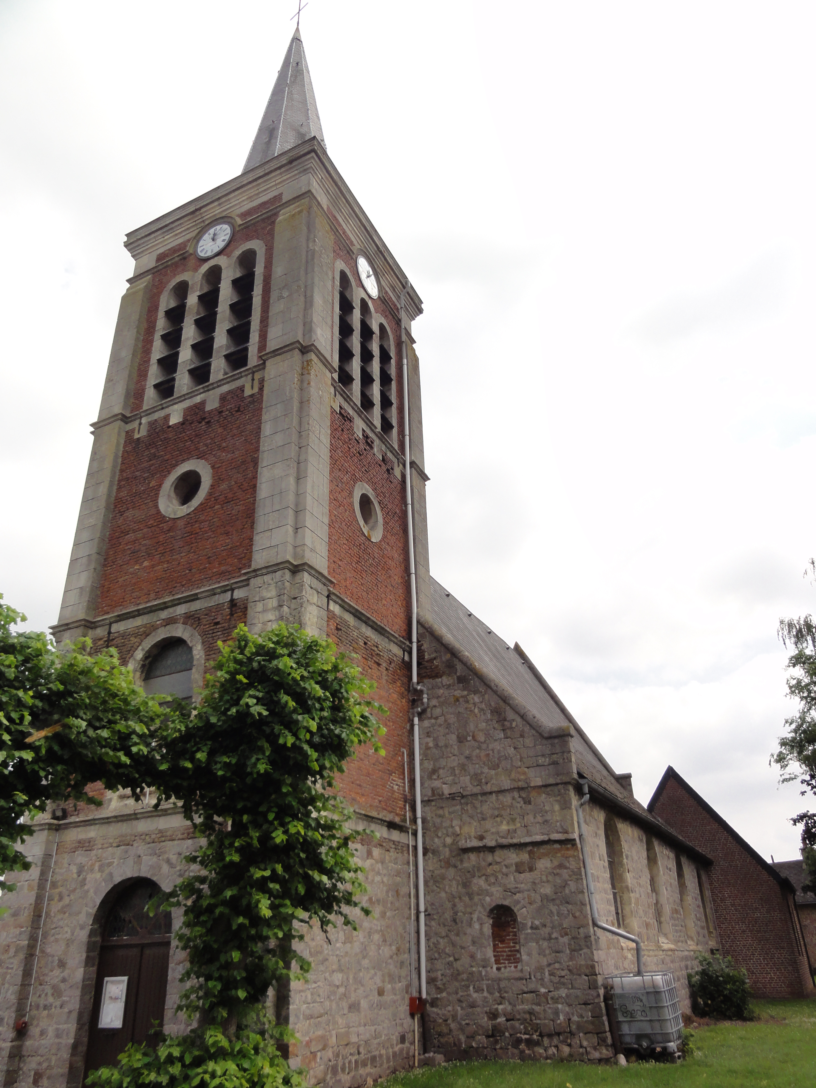 Verchain-Maugré (Nord, Fr) église